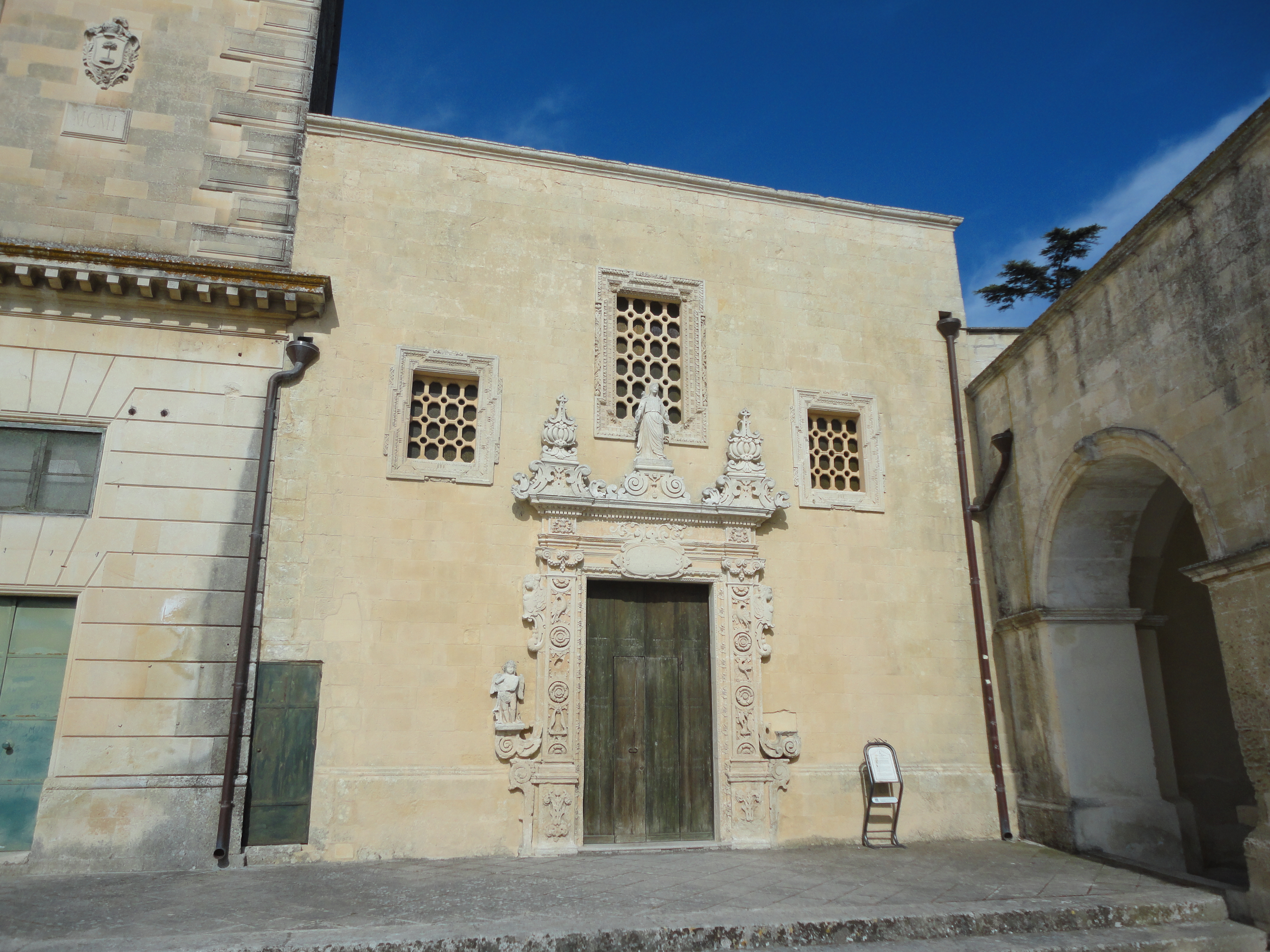 Chiesa dell'Assunzione della Vergine di Melpignano, Lecce